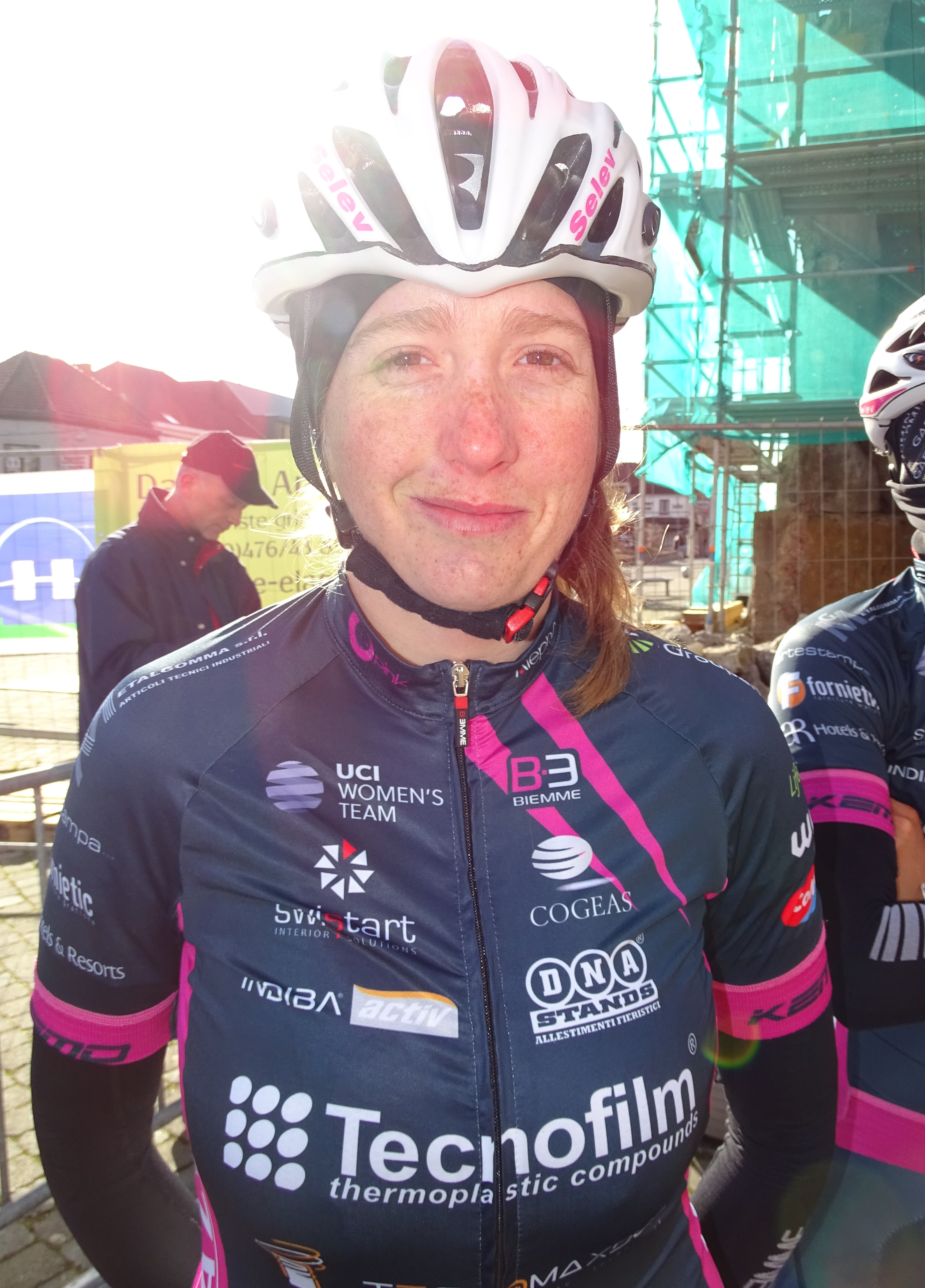 Reportage réalisé le mercredi 2 mars à l'occasion du départ du Samyn des Dames 2016 et du Samyn 2016 à Quaregnon, Belgique.